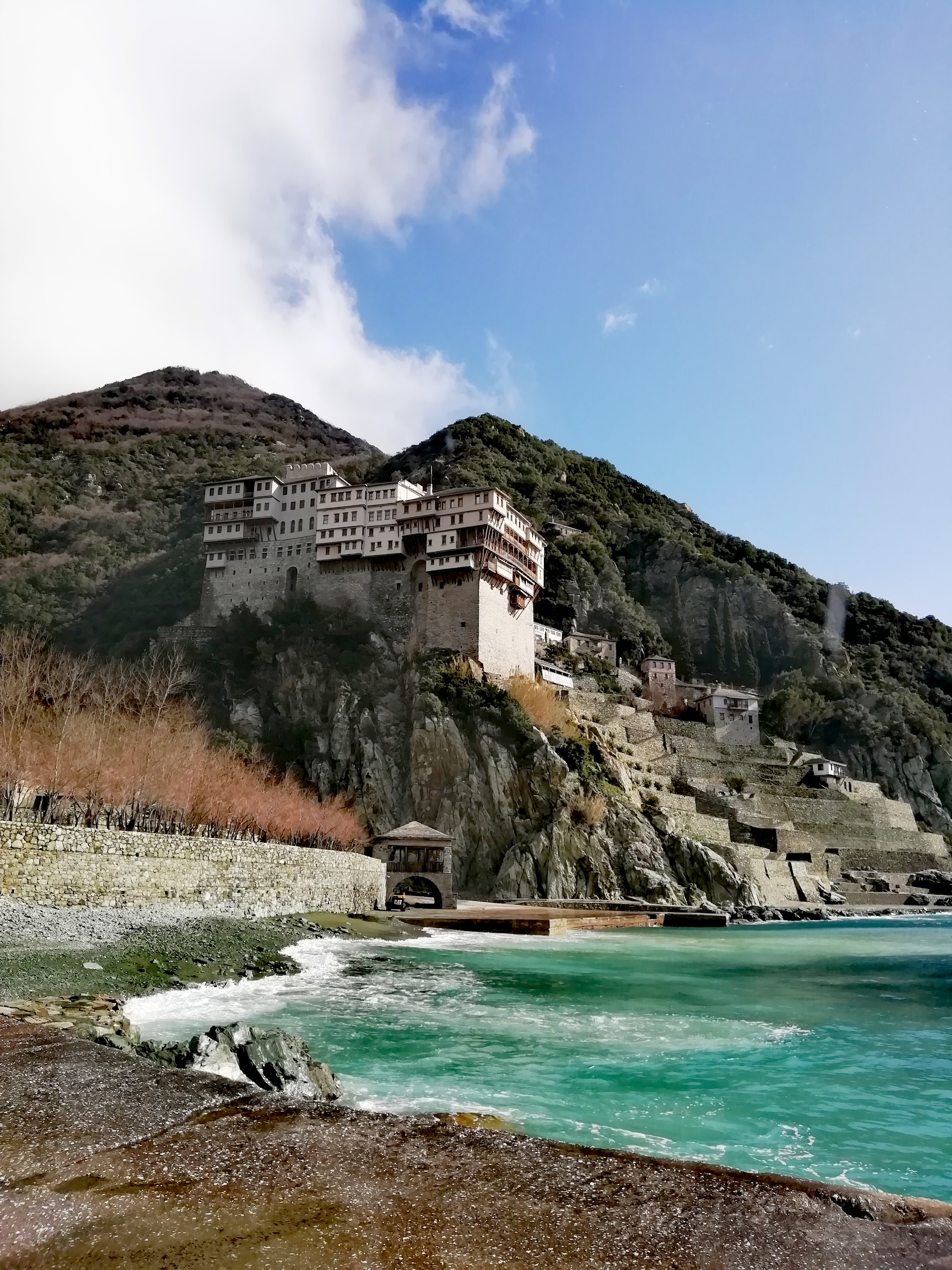 Η Ιερά Μόνη όπως διακρίνεται από τον αρσανα της. This is a photography of Natura 2000 protected area with ID GR1270003